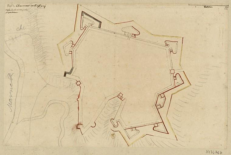 Plan de Chaumont en Bassigny : dessin